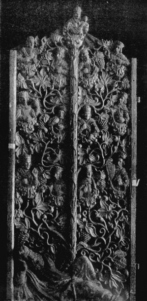 Царські врата з розібраної Введенської церкви у Ковелі, XVI-XVII ст.